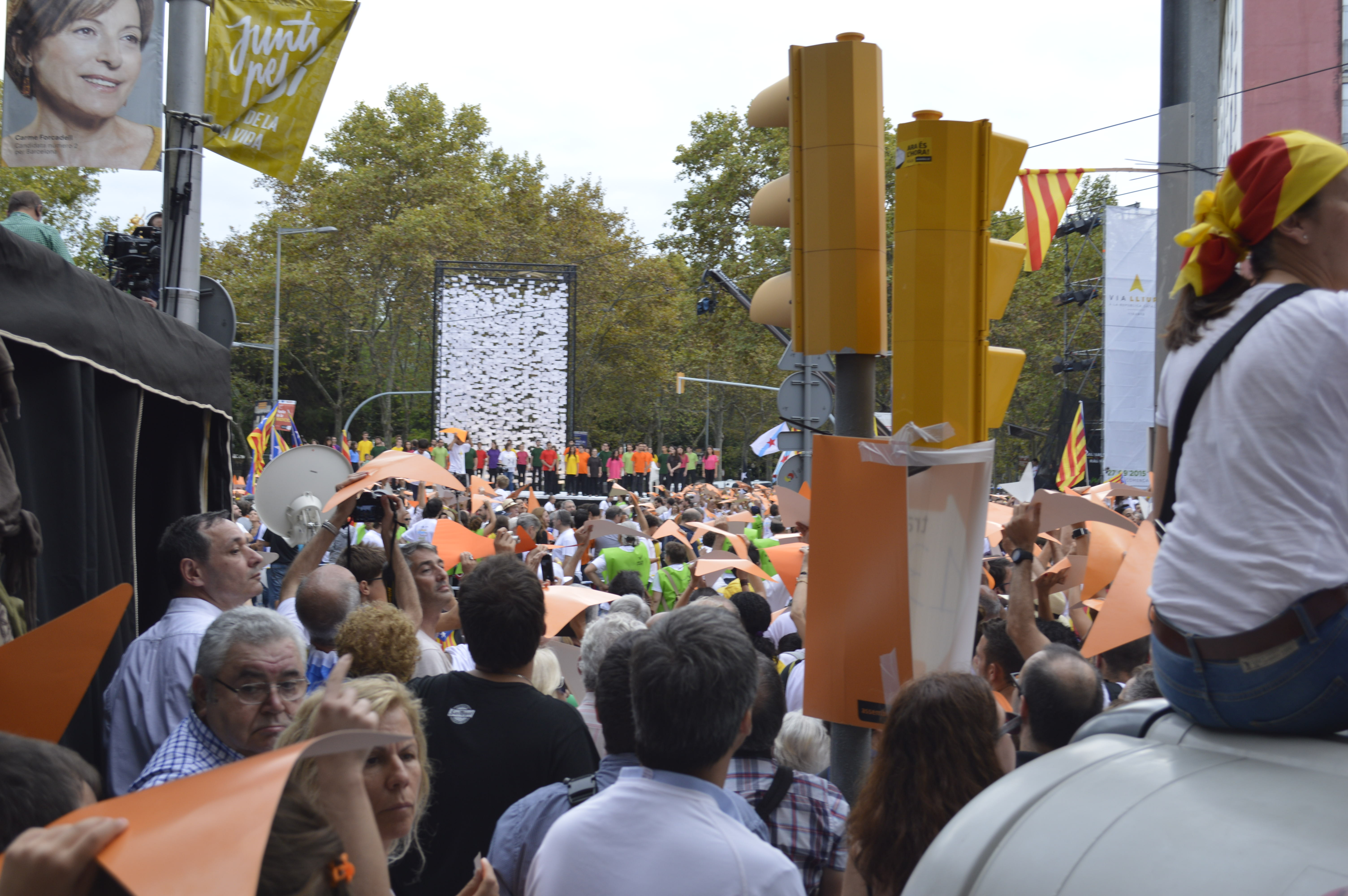 Via Lliure 2015 a la Meridiana. Fotos de Toniher